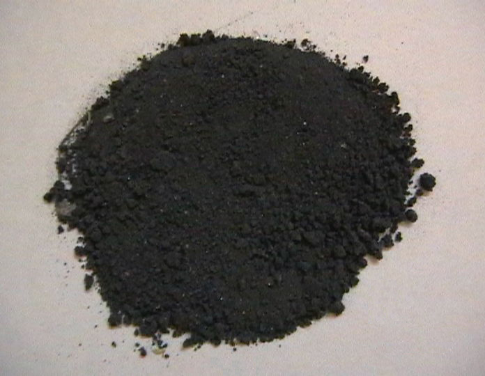 Magnesium silicide